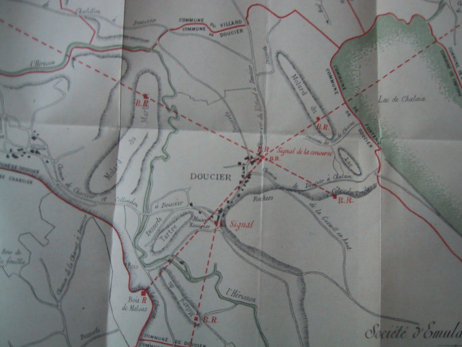 affaissements de sols à Doucier